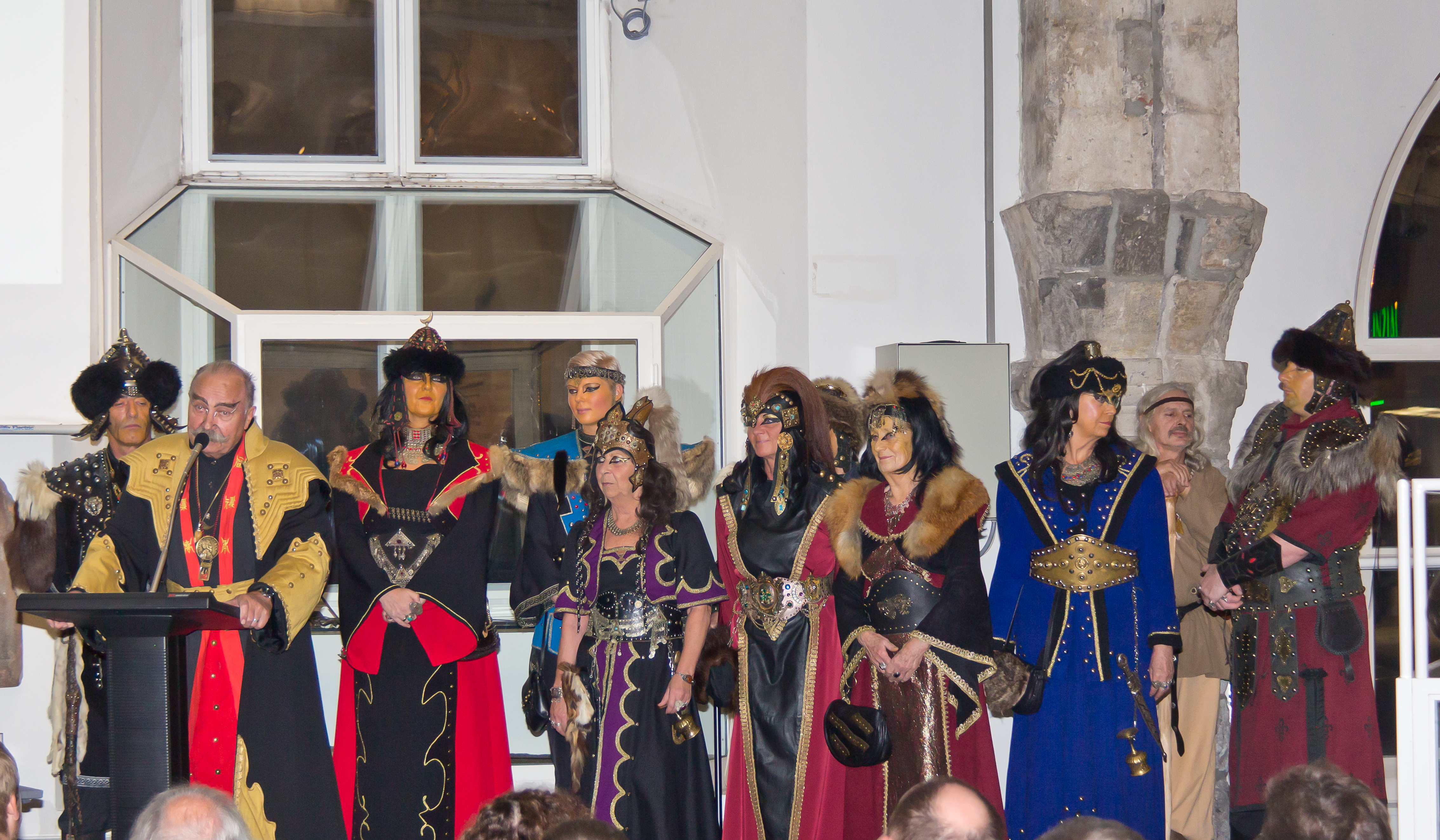 Eröffnung der Ausstellung im Kölnischen Stadtmuseum: „Ralf König: Das Ursula-Projekt. Elftausend Jungfrauen“ Foto: Mitglieder des 1. Kölner Hunnen Horde e. V.